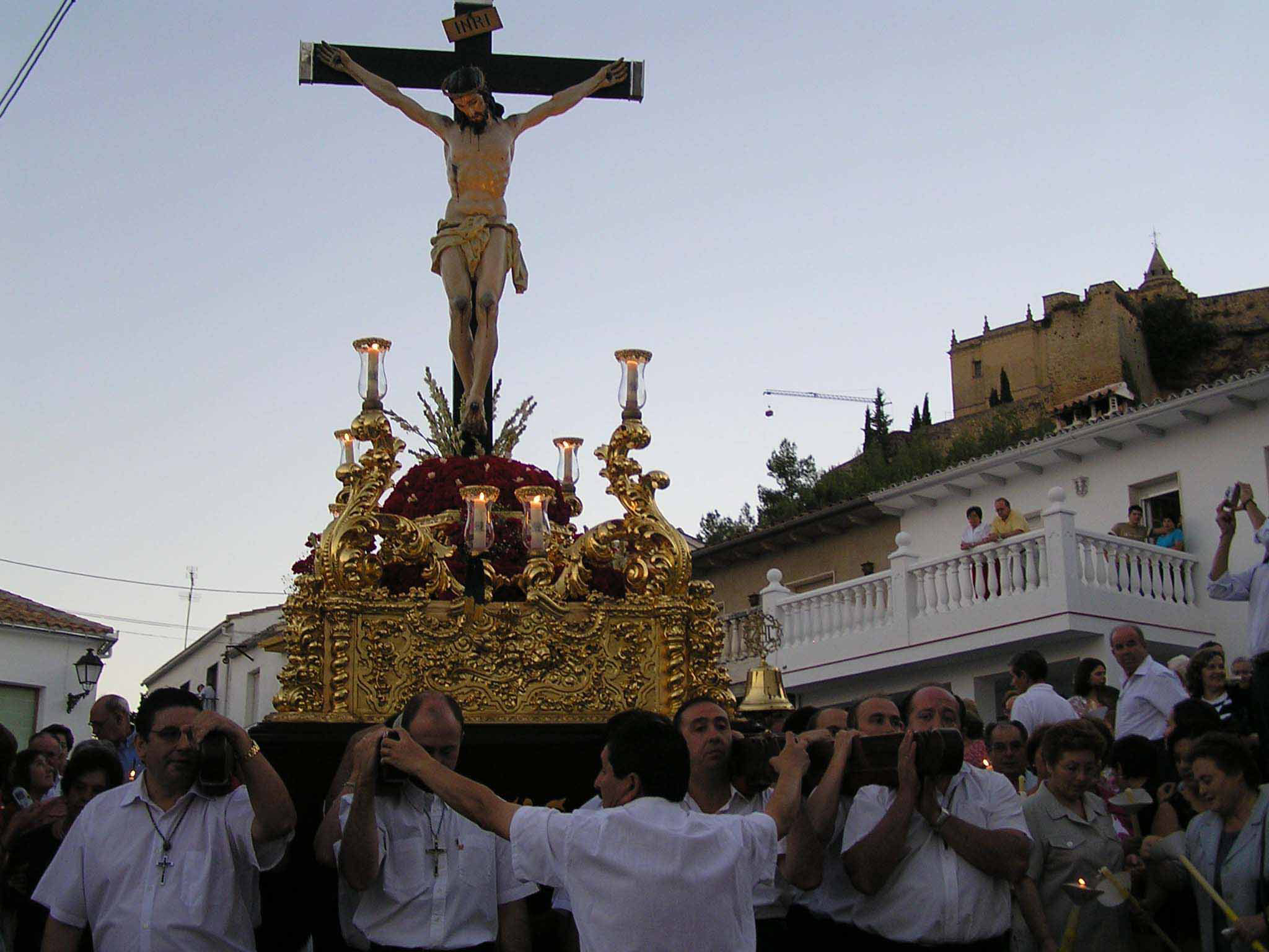 Procesión del Cristo en Alcalá la Real, Jaén, España.